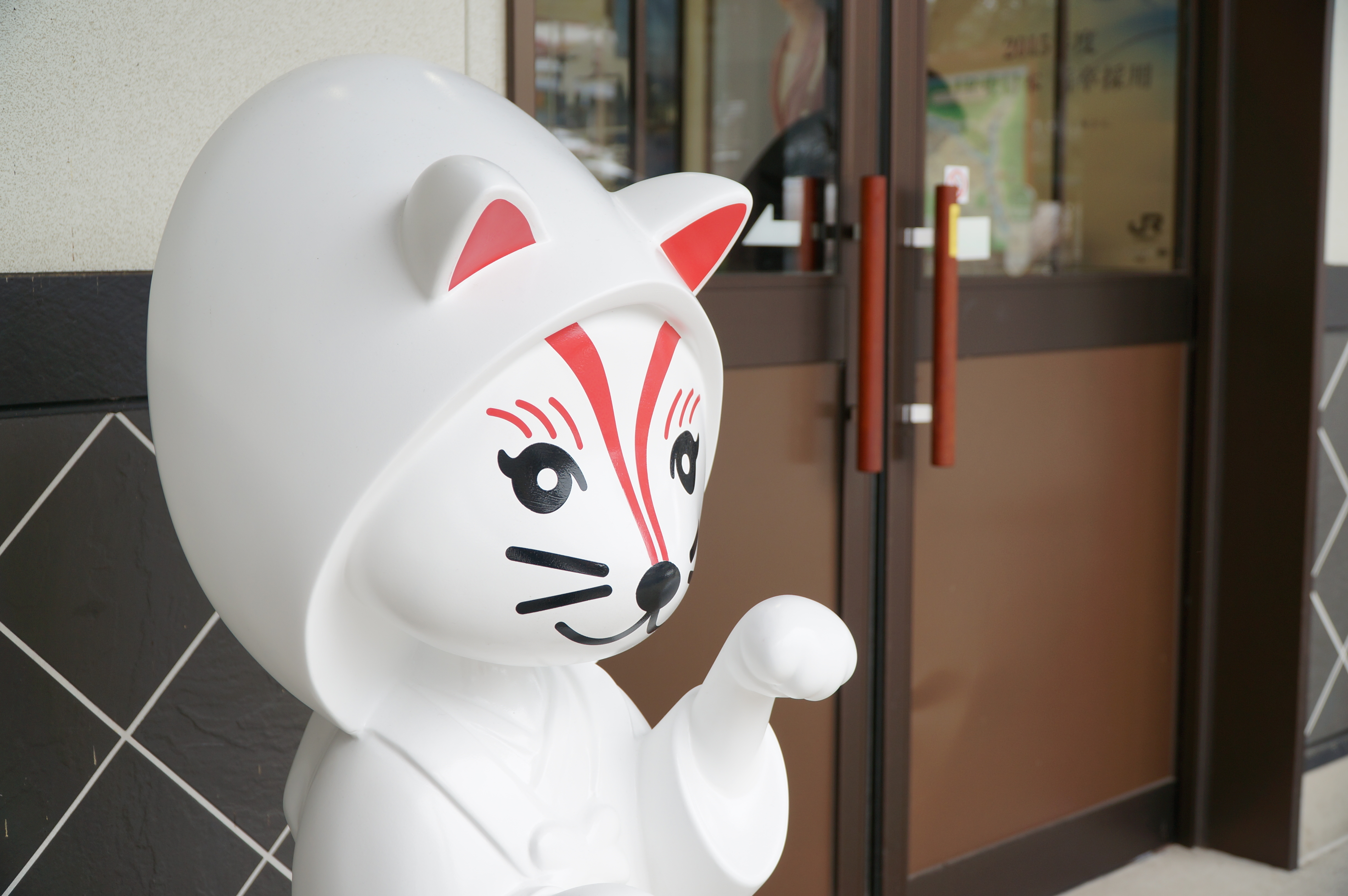 駅舎入口（2013年12月）